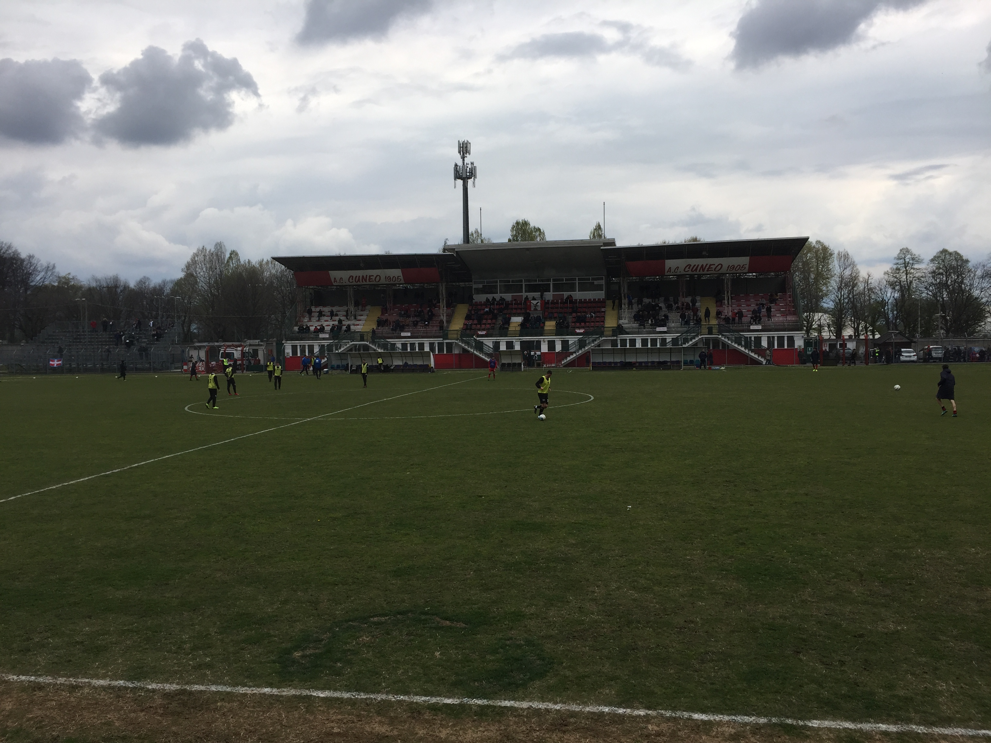 Interno stadio comunale Cuneo (IT) il 6 aprile 2019